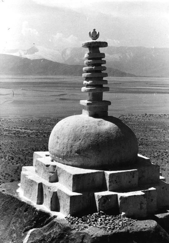 Samyeh, Tschorten bei Samyeh